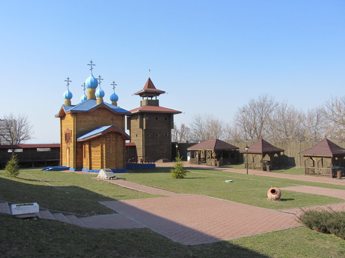 Мазыр. Забудова Замкавай гары